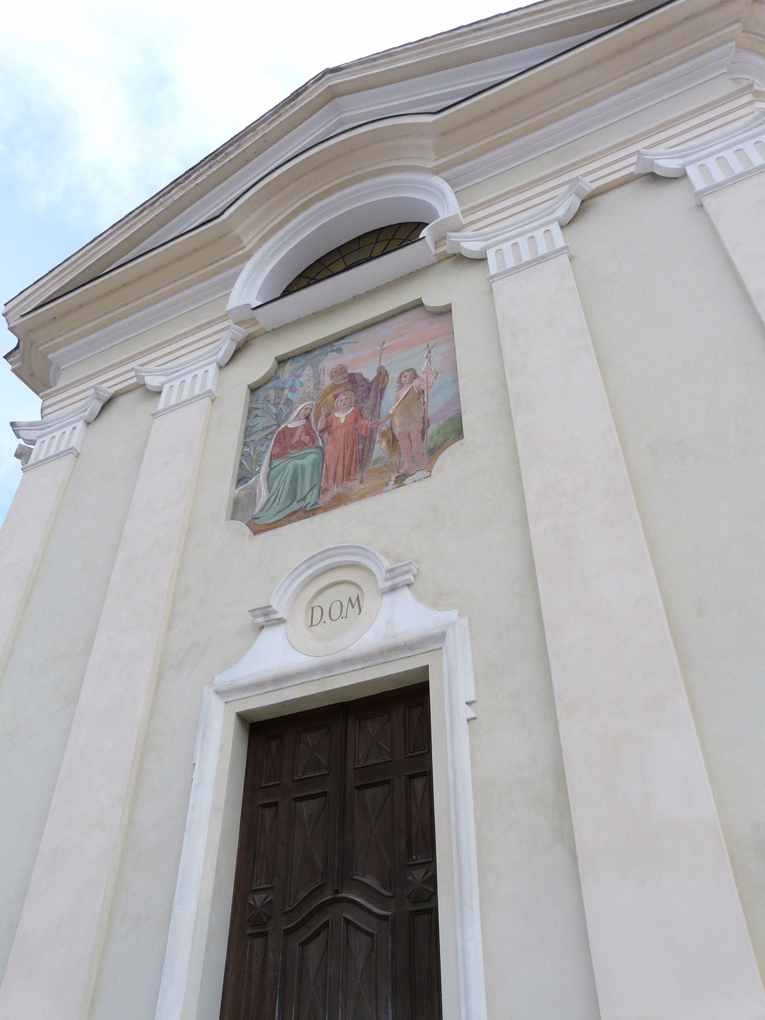 Chiesa del Santo Nome di Maria, Osiglia, Liguria, Italia